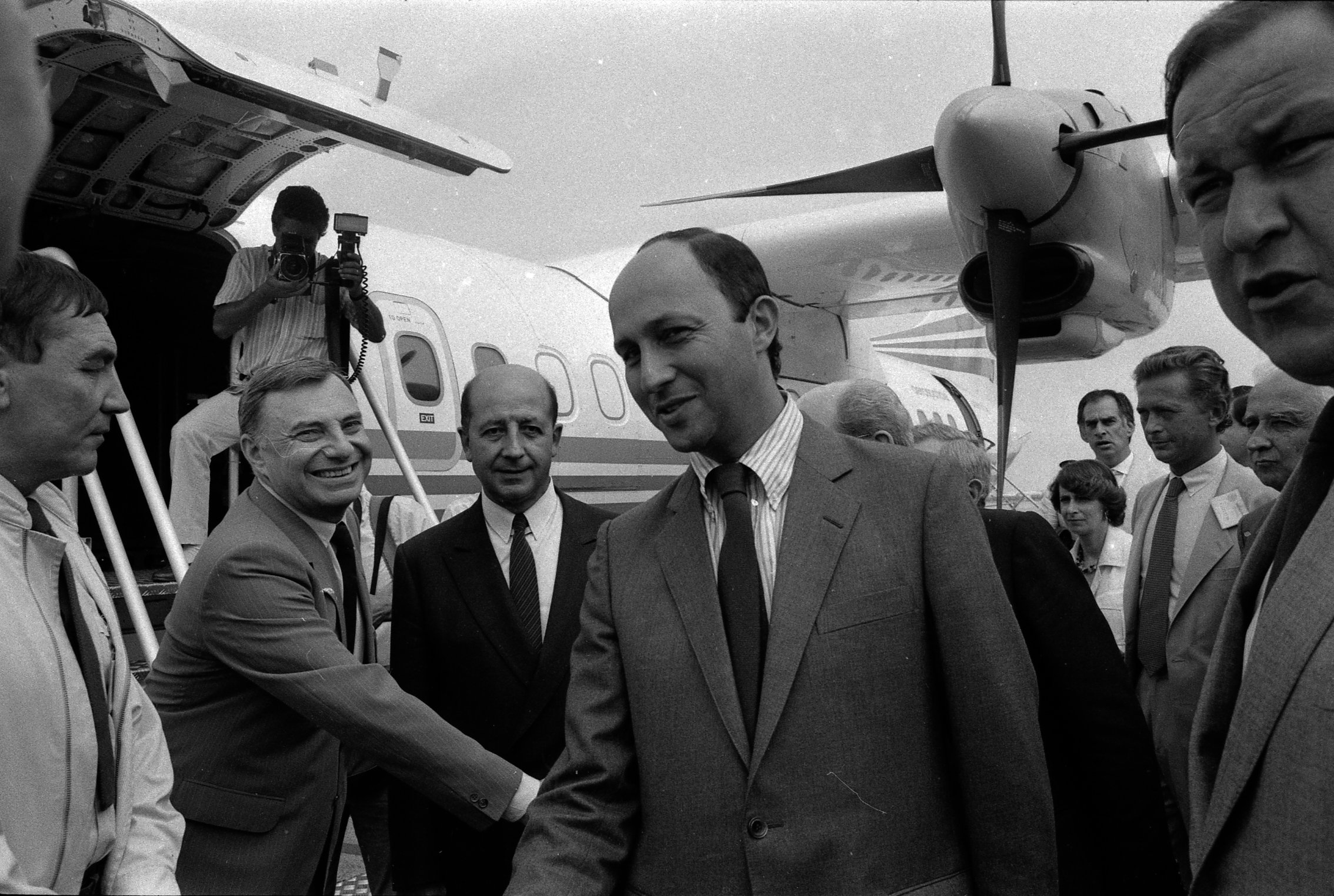 Aéroport Toulouse-Blagnac. Le 28 Août 1984. Vue de Dominique Baudis et de Laurent Fabius à proximité d'un avion.